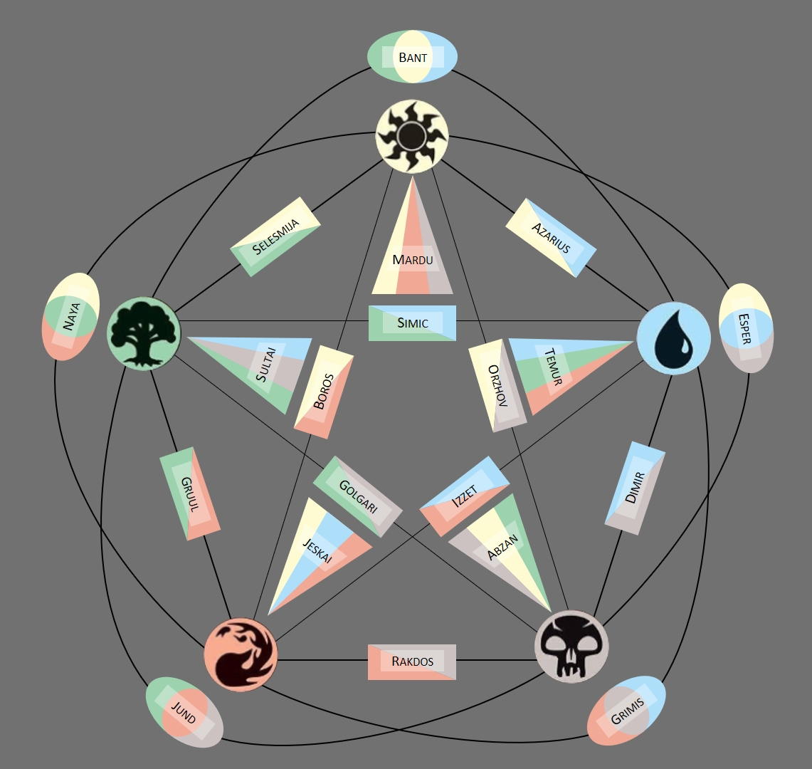 In den Rechtecken sind die "Gilden von Ravnica" in den jeweiligen zwei Farben dargestellt. Die Dreifarbigen die " Shards of Alara" sind in den Ovalen abgebildet, sowie die "Clans of Tarkir" in den dreieckigen Pentagramspitzen, so dass mittig die Hauptfarbe und links/rechts die beiden sekundären Farben zu sehen sind. Überarbeitung des Originals